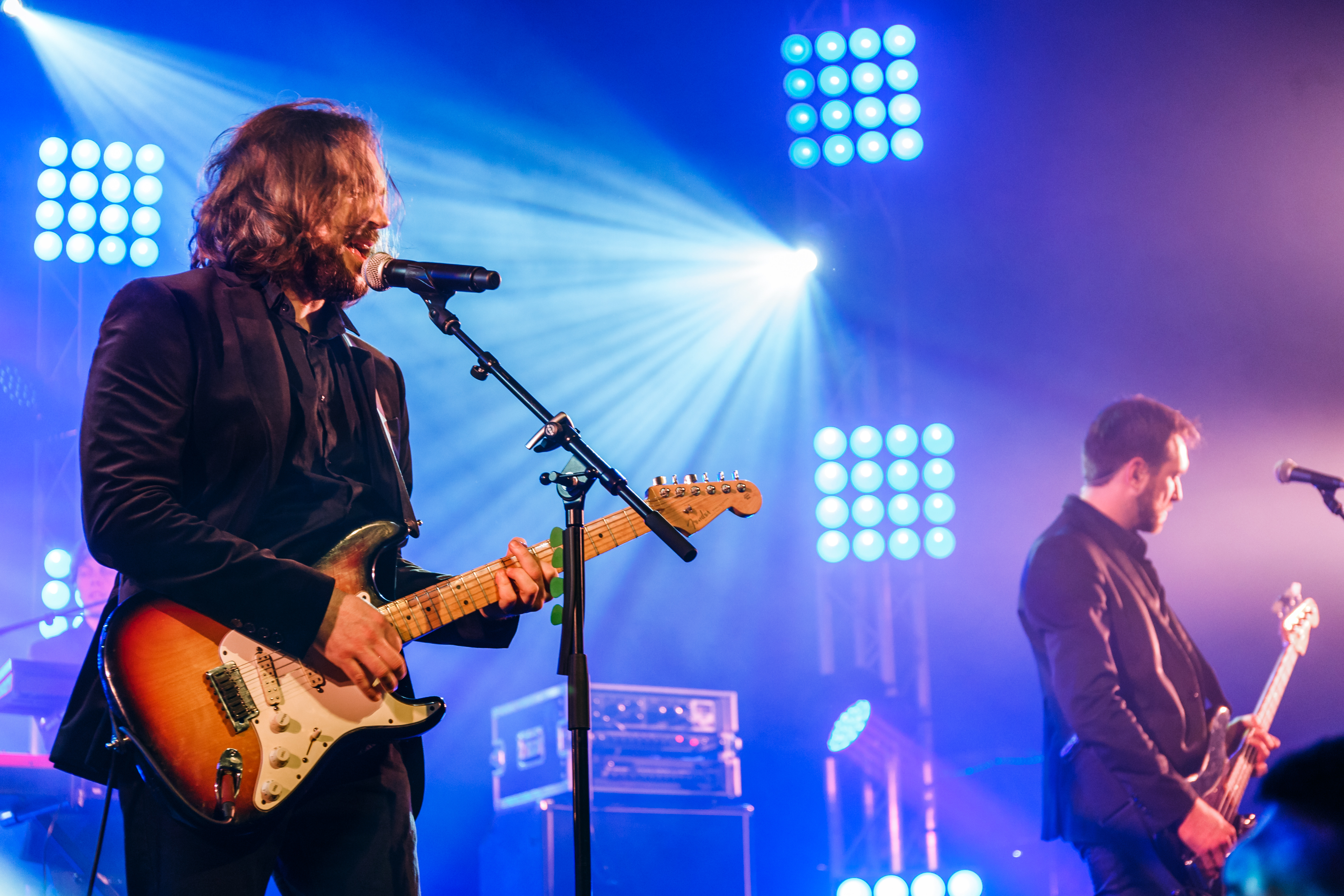 Premier concert du groupe Matmatah suite à sa reformation en 2016 à l'occasion de l'émission L'Avant-Scène tournée à l'Espace Avel Vor de Plougastel le 16 février 2017.